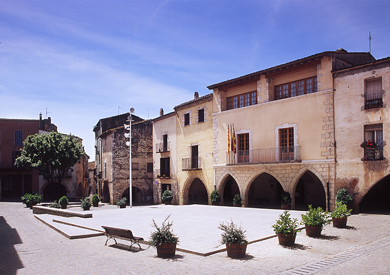 Ajuntament de Peralada